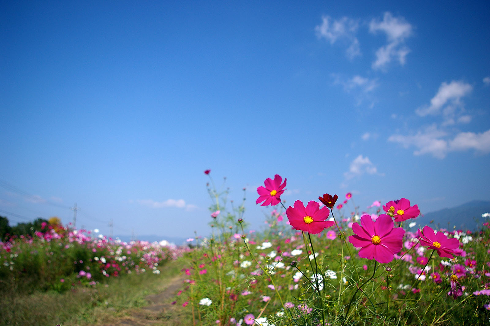 Yume-cosmos-park